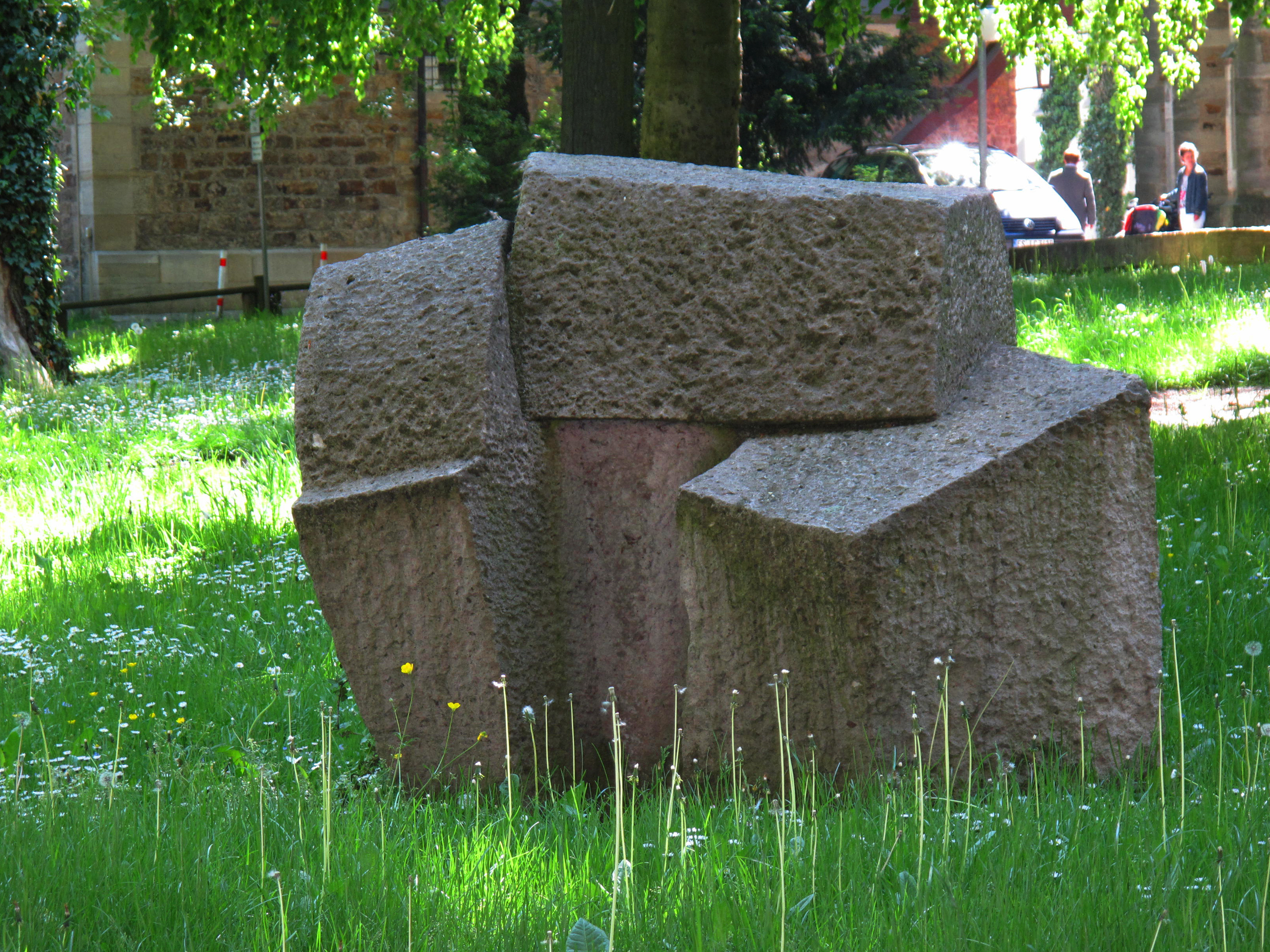 Kirchheimer Kunstweg: Pinuccio Sciola, Sciola-Stein, 1979, - Deutschland, Baden-Württemberg, Kirchheim/Teck, Martinskirche, Alleenstraße